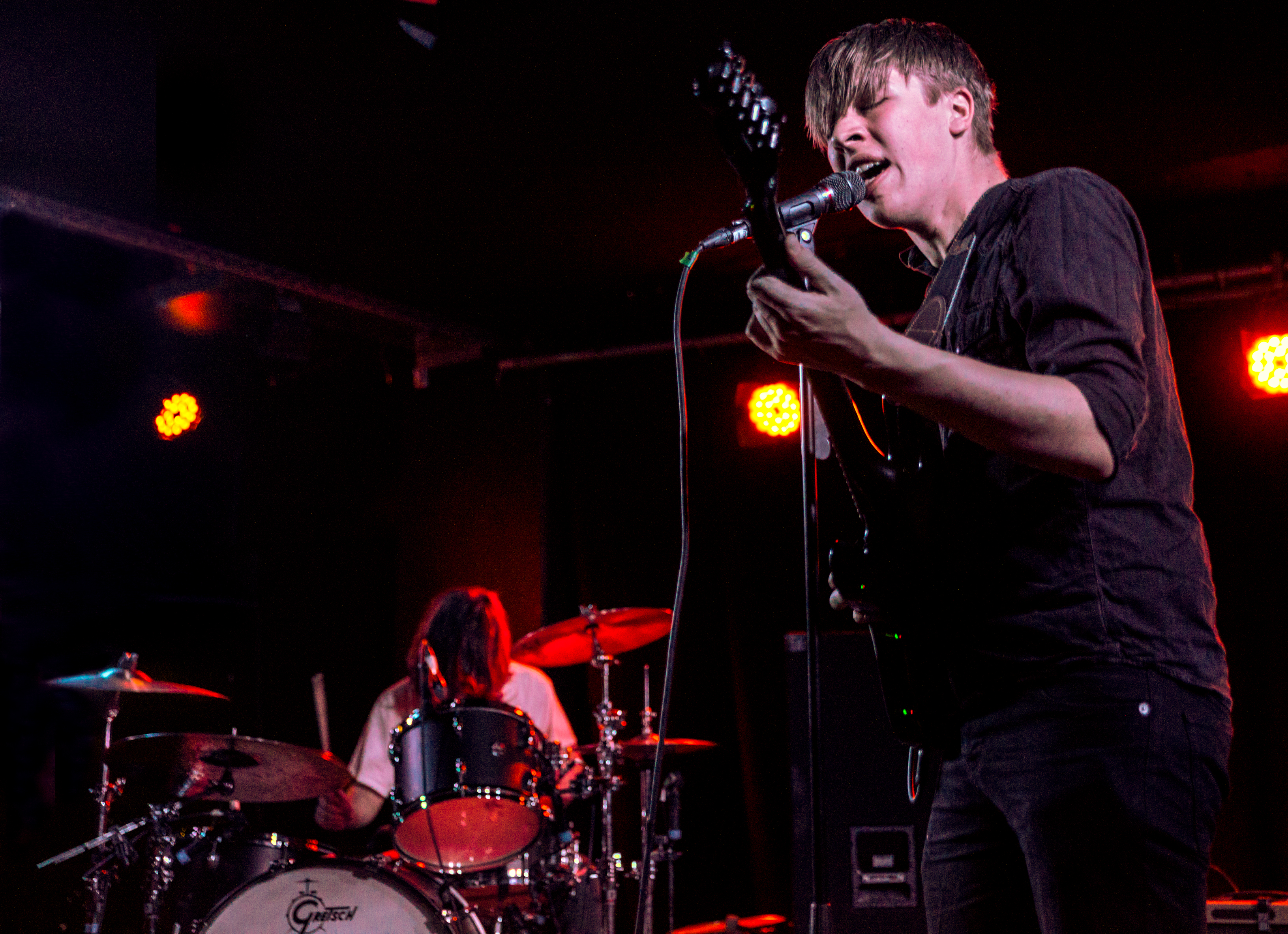 de Drenge 2014 Muenchen Strom